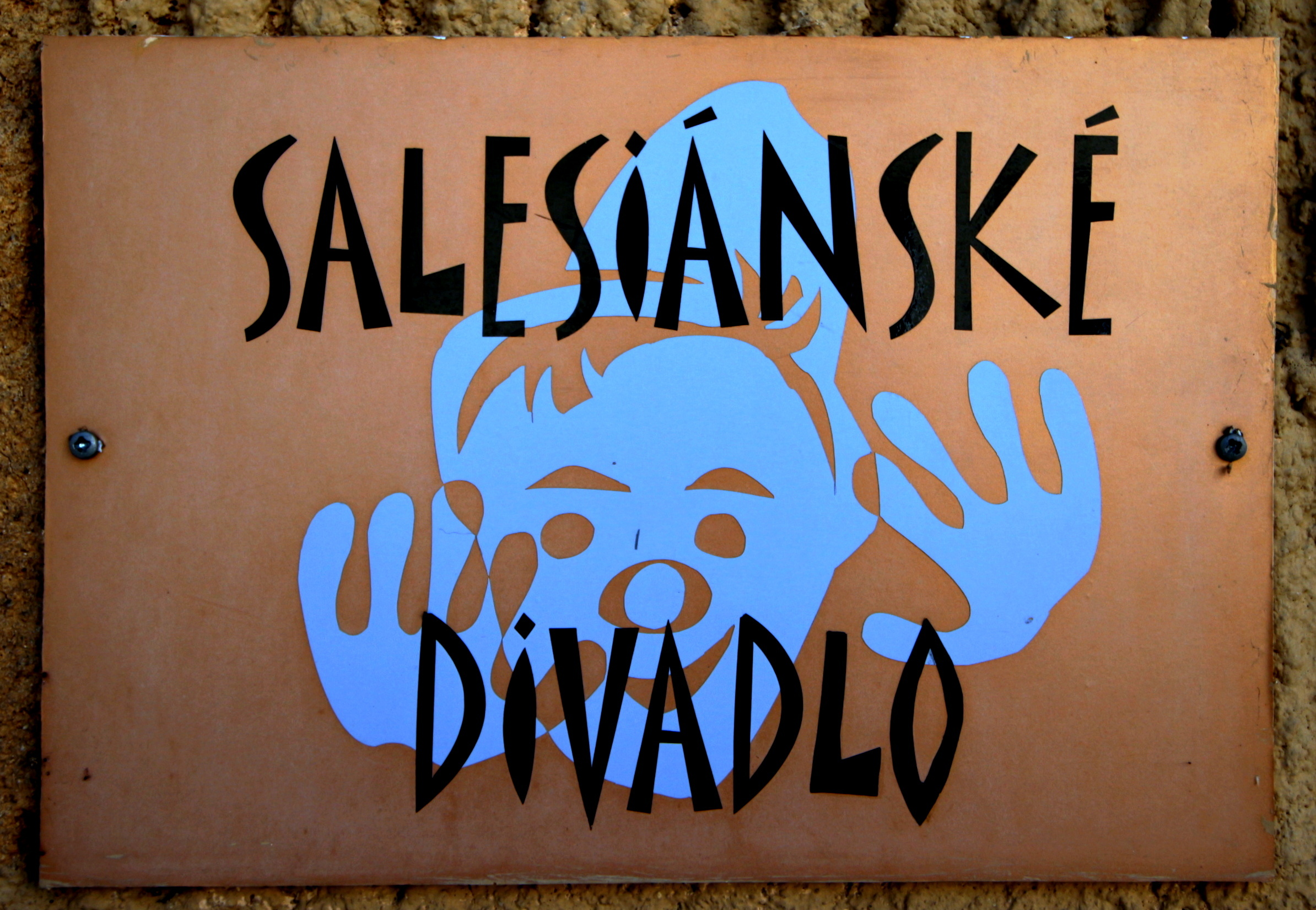 Salesiánské centrum Praha-Kobylisy